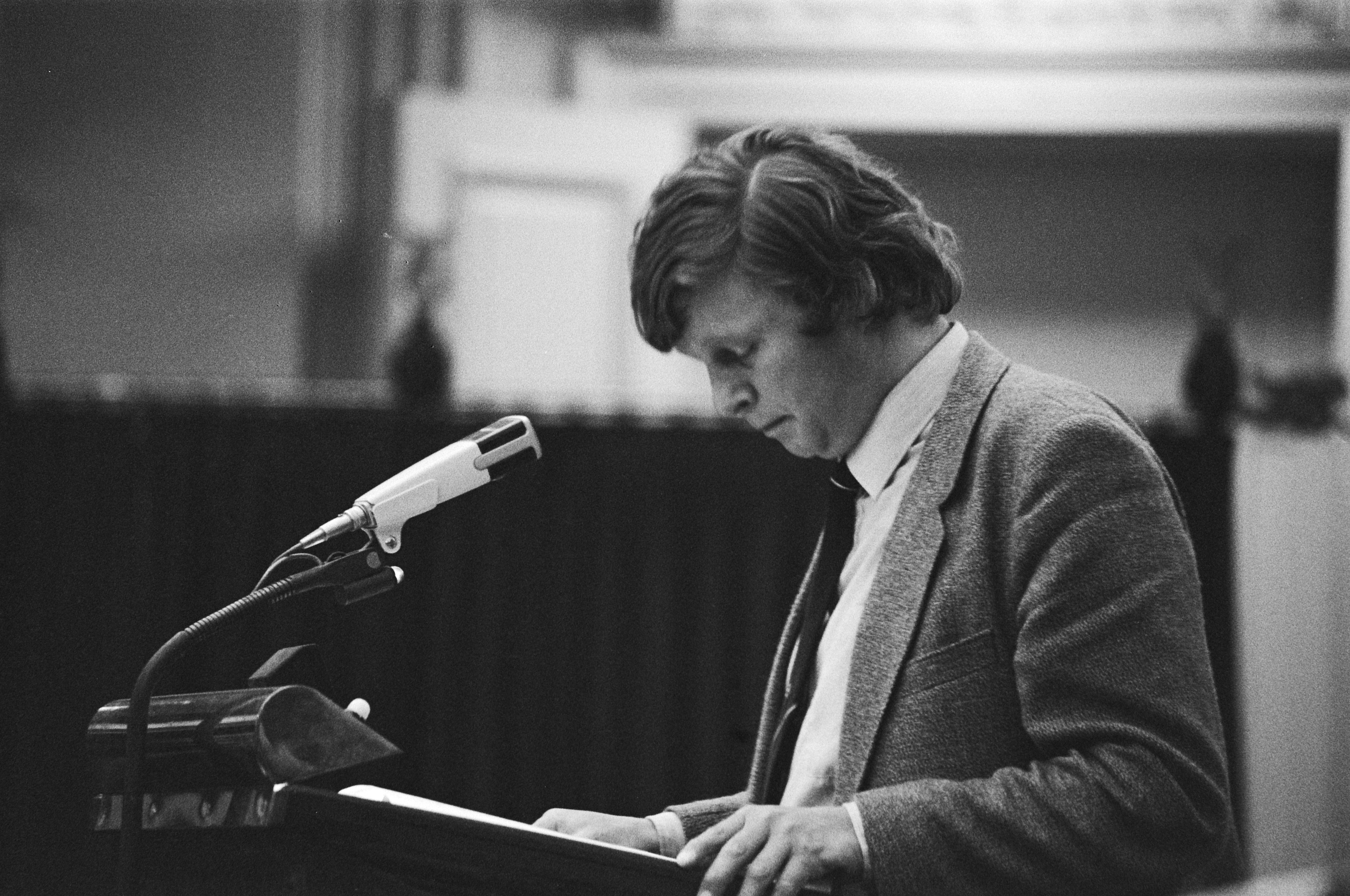 Collectie / Archief : Fotocollectie Anefo Reportage / Serie : [ onbekend ] Beschrijving : Ernst Bakker D66 in Tweede Kamer aan het woord Datum : 11 juni 1981 Locatie : Den Haag, Zuid-Holland Trefwoorden : parlementaire debatten, parlementariërs, poltiek Persoonsnaam : Bakker, Ernst Instellingsnaam : D66, Tweede Kamer Fotograaf : Antonisse, Marcel / Anefo Auteursrechthebbende : Nationaal Archief Materiaalsoort : Negatief (zwart/wit) Nummer archiefinventaris : bekijk toegang 2.24.01.05 Bestanddeelnummer : 931-5395